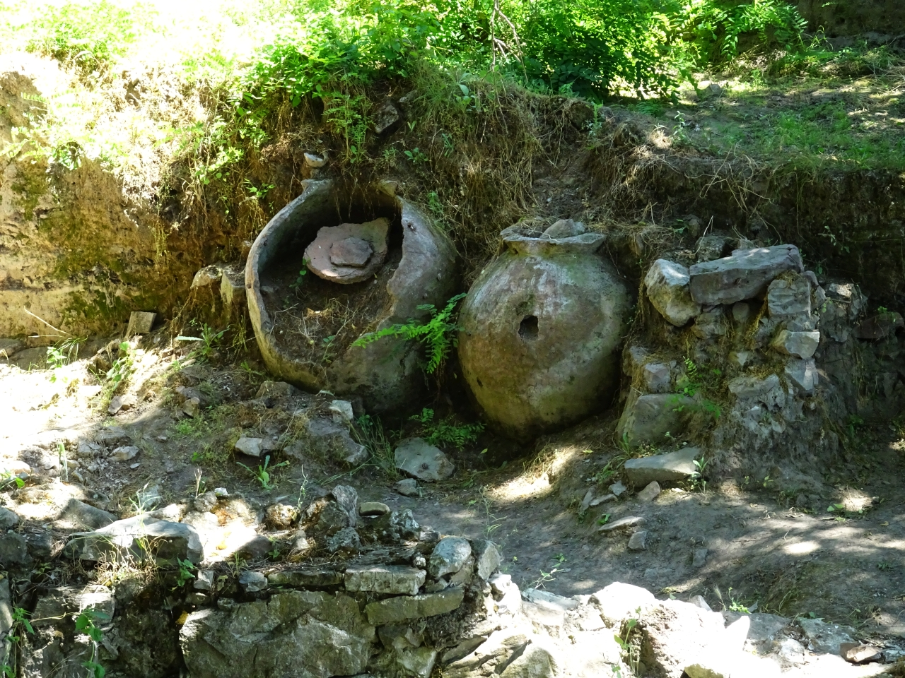 Cetatea Aegyssus 02